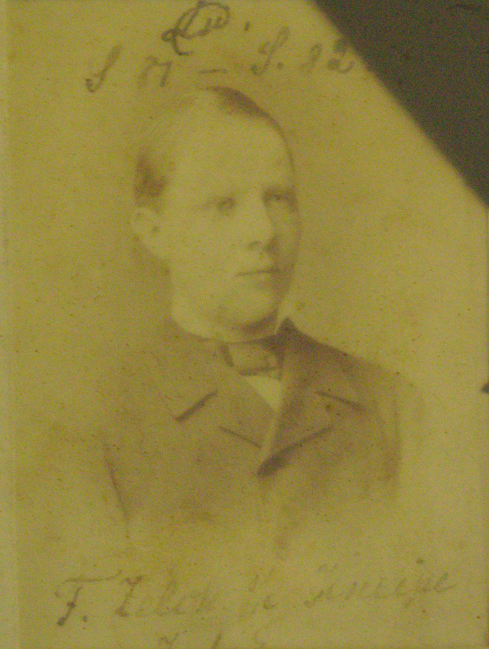 Fotografie von Friedrich Zelck als Mitglied der Studentenverbindung Leonensia. Standort: Ahnengalerie im Conventssaal der Verbindung Leonensia in Heidelberg